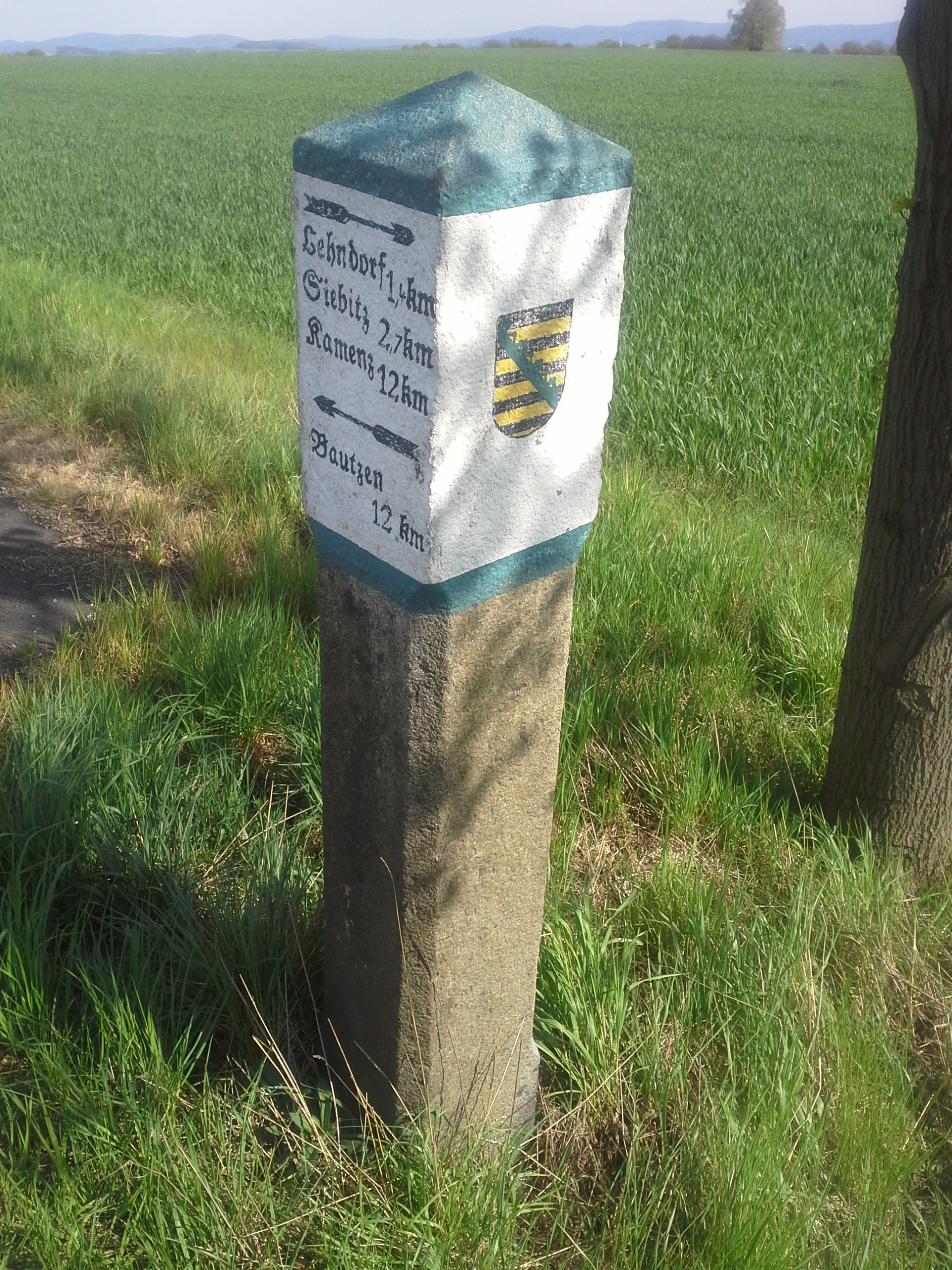 Wegweiserstein bei Paßditz (Göda) Hornjoserbsce: Kamjentny pućnik pola Pozdec.